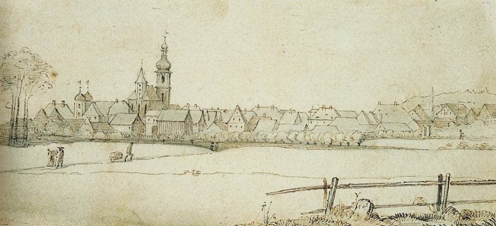 Frauenaurach von Osten, Sepiazeichnung von Carl Haag